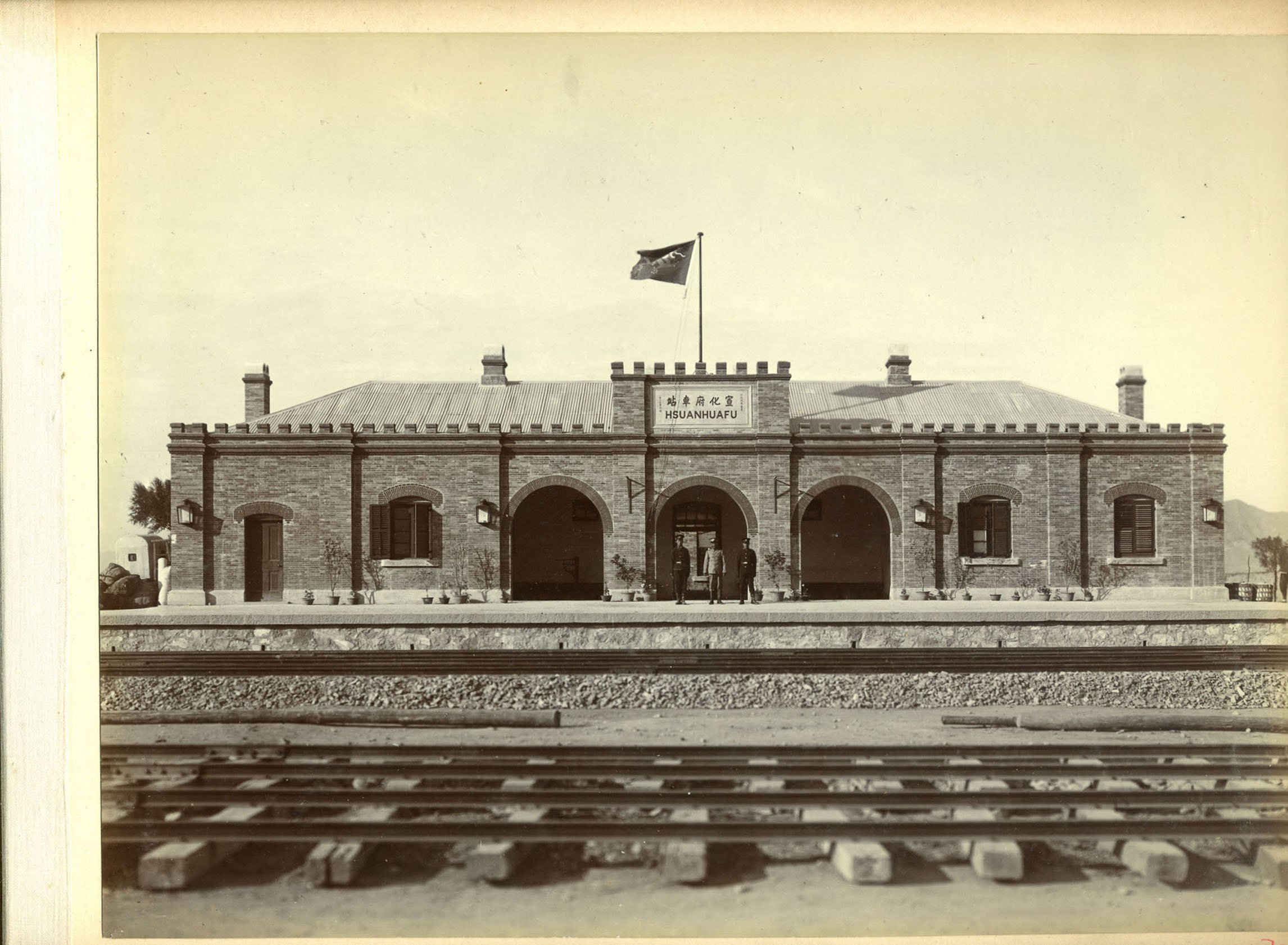 宣化府车站，今宣化站